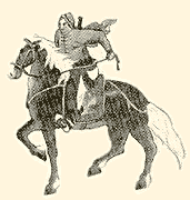 Chao Fu-tien, um dos líderes dos boxers